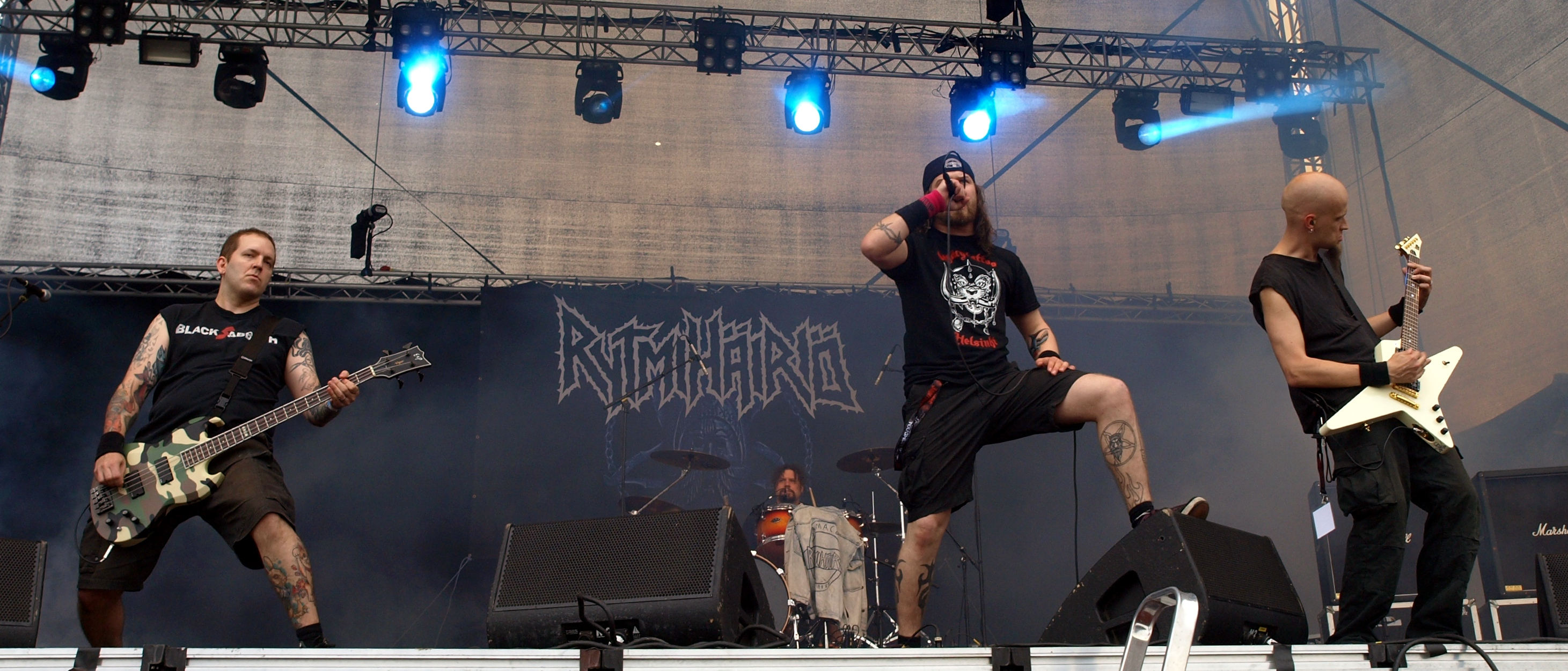 Rytmihäiriö live am Myötätuulirock 2011